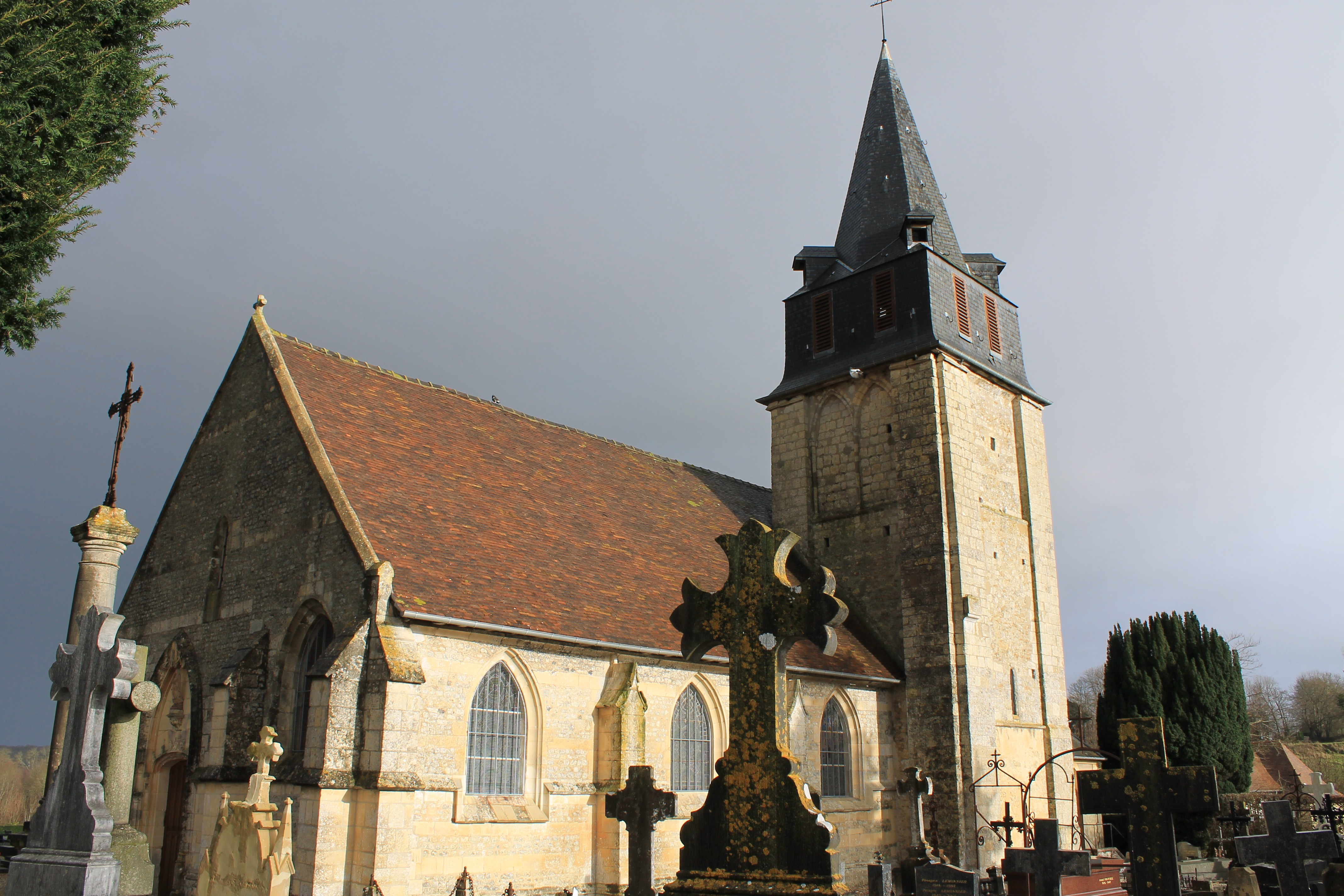 Église Notre-Dame-de-la-Visitation de Blonville-sur-Mer (Calvados)